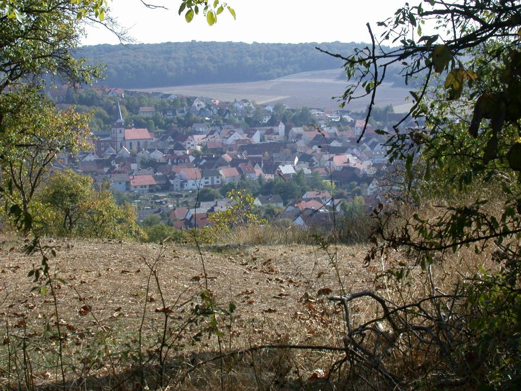 Distanzaufnahme des Ortskerns von Neubrunn. Es sind Kirche sowie Zentral im oberen drittel im Bild das Torhaus zu erkennen.